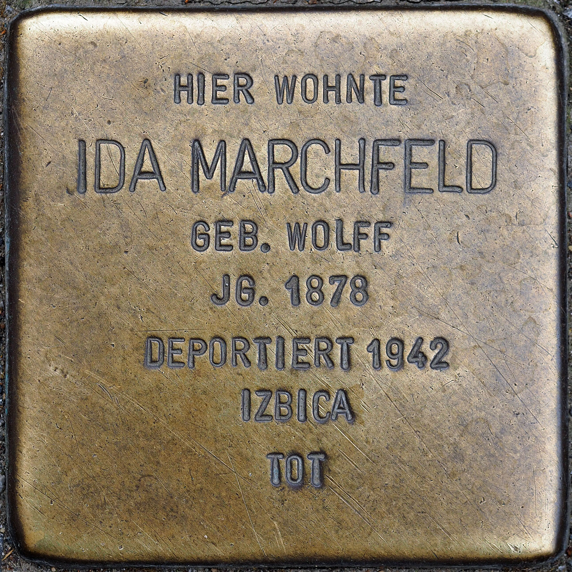 Stolpersteine MG: Marchfeld, Ida